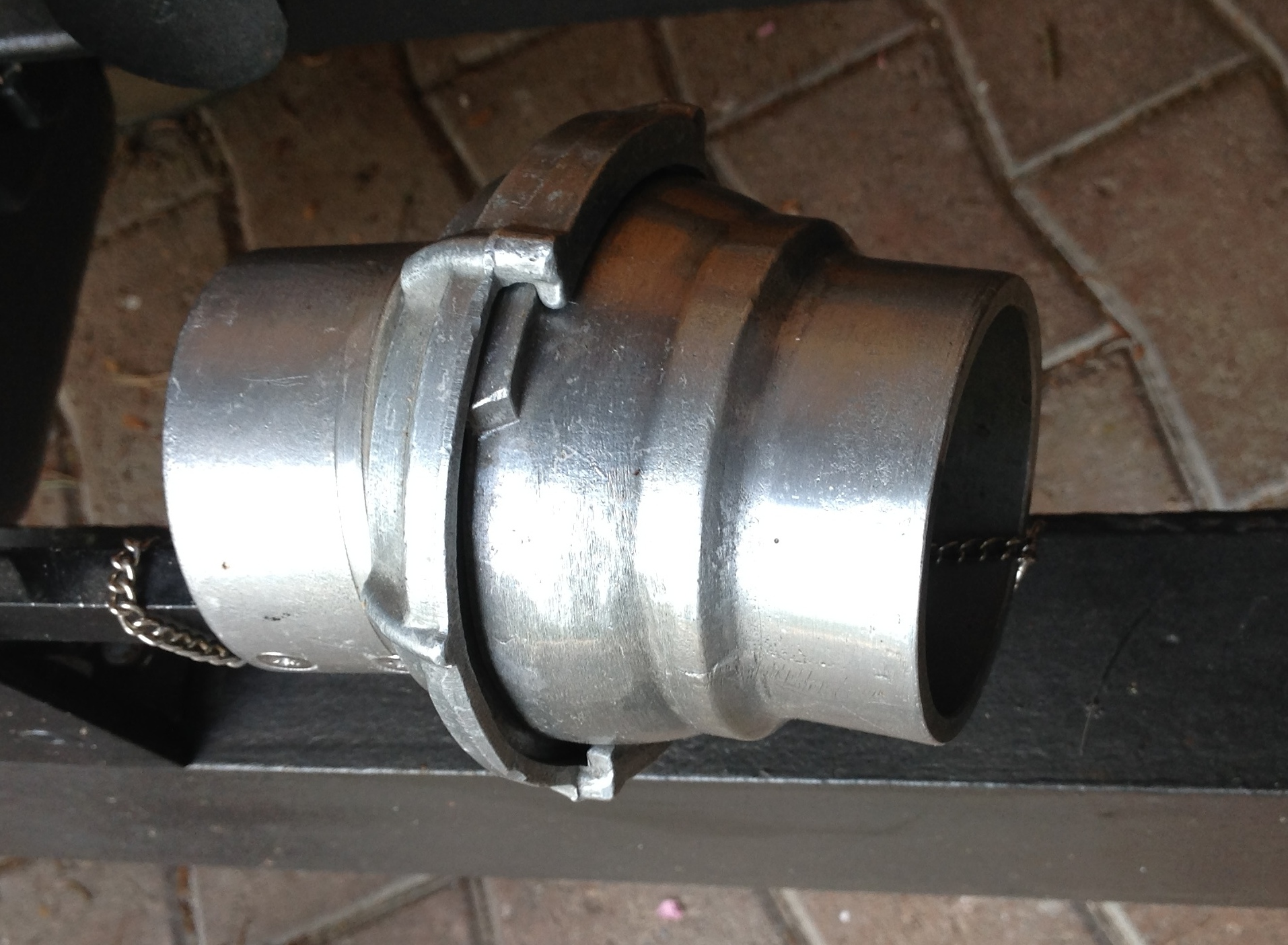 Kugelgelenk-Rohrkupplung für flexible Jauche- und Wasserleitungen, Erfinder: Hermann Spiess (1866-1930), Kundelfingerhof